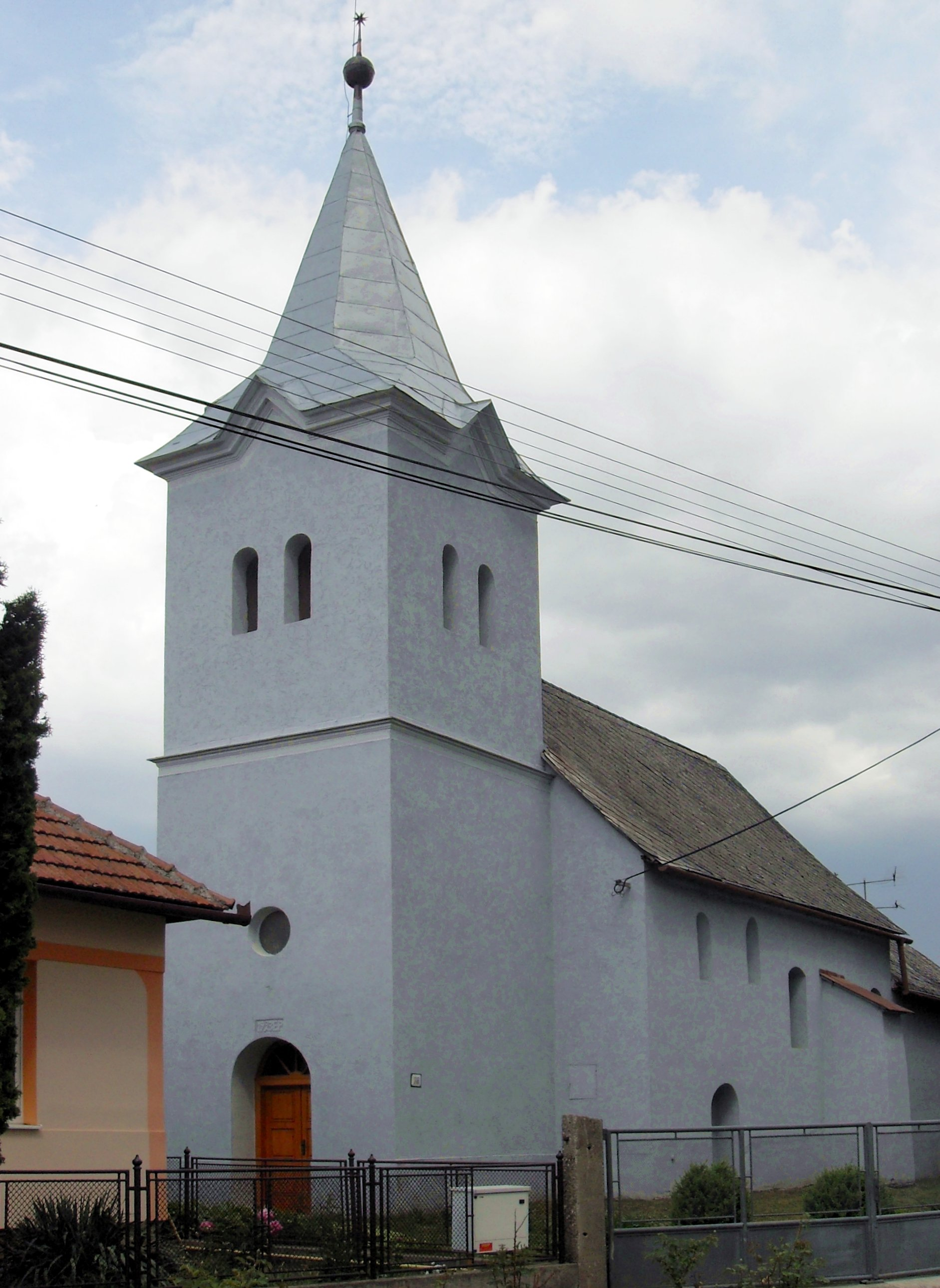 Peder, Kostol Mena Panny Márie